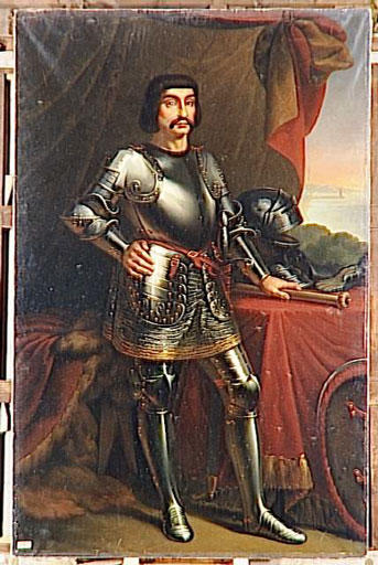 Copie d'après un original conservé au château de Beauregard ; commandé par Louis-Philippe pour le musée historique de Versailles en 1834